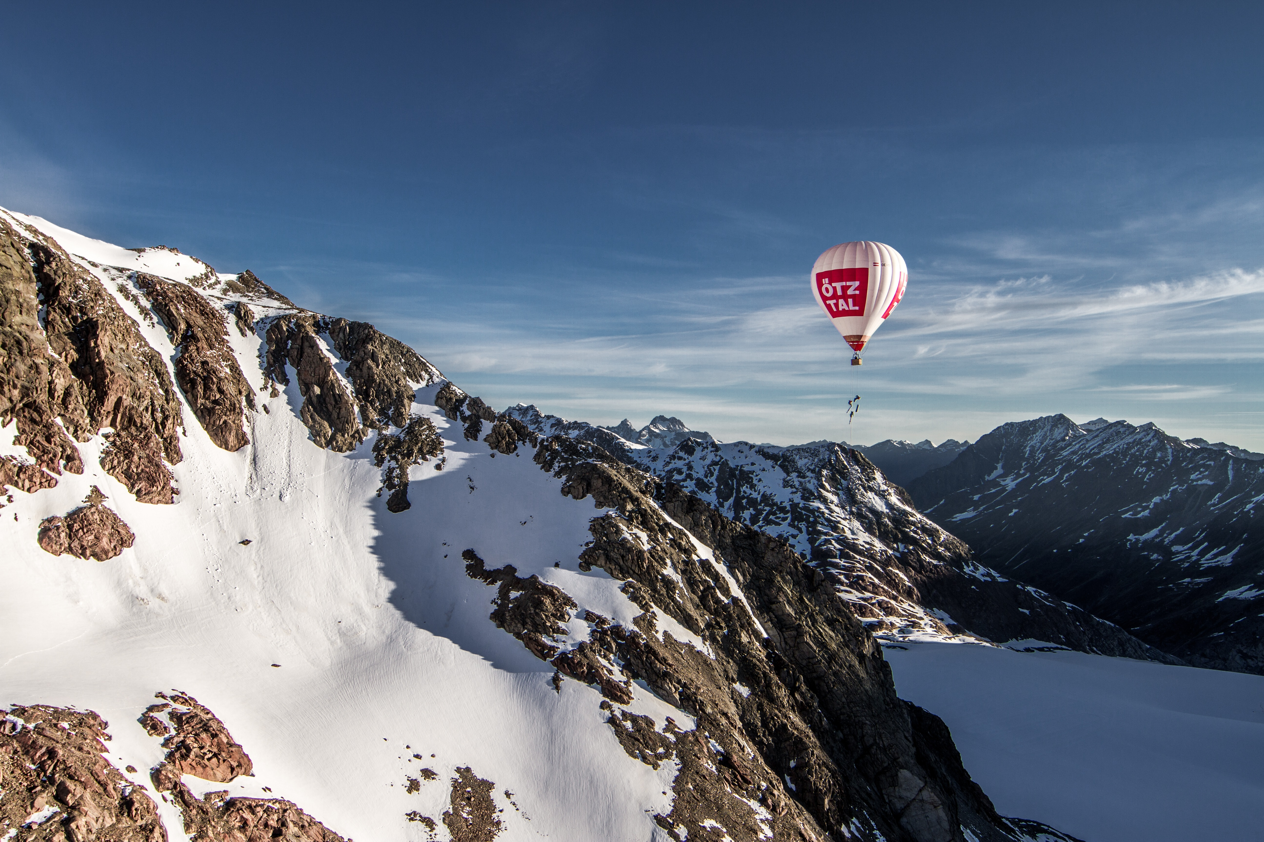 Balloonskiing _ Ötztaler Alpen